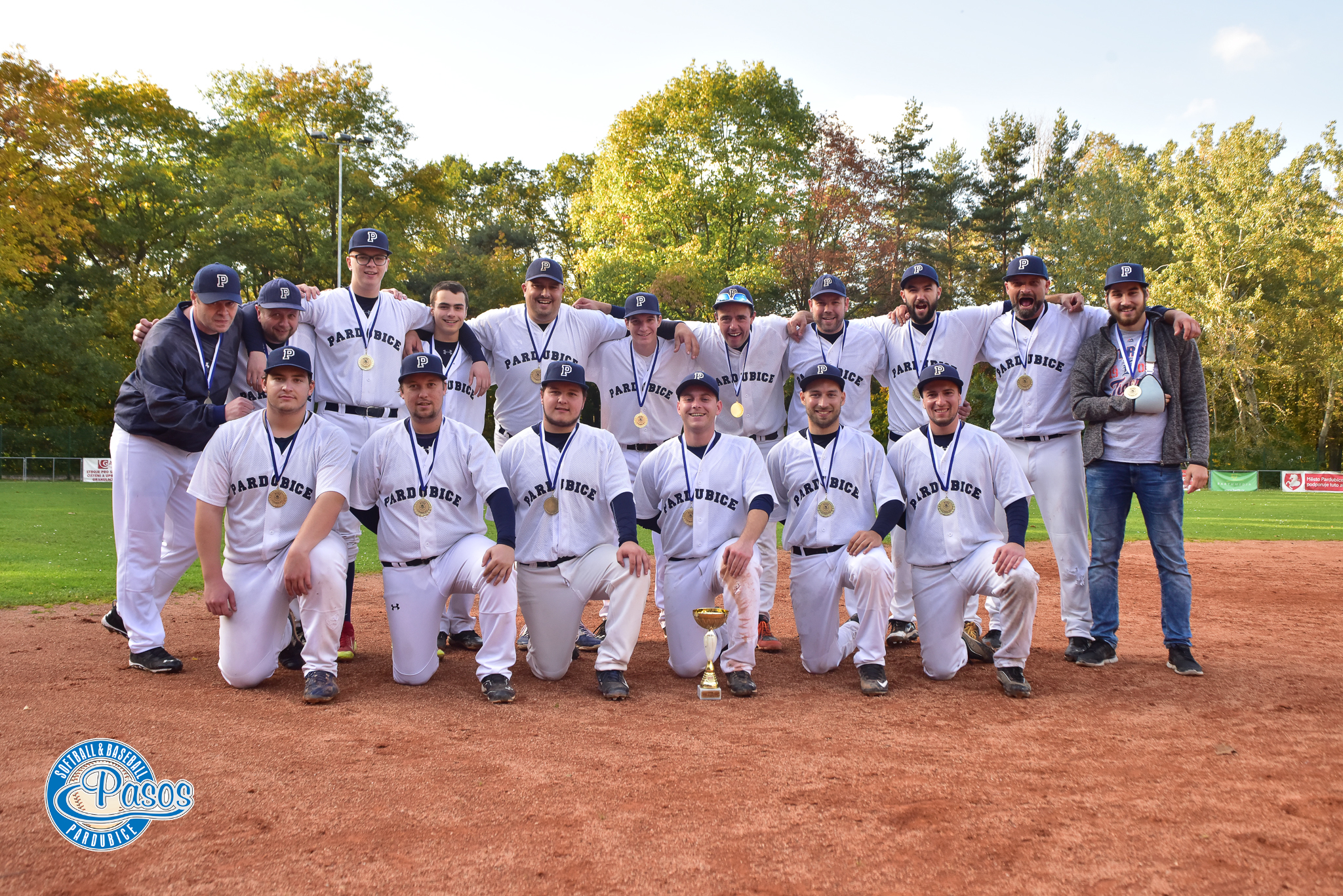 Vítězná fotografie mužského A týmu po postupu do Extraligy.